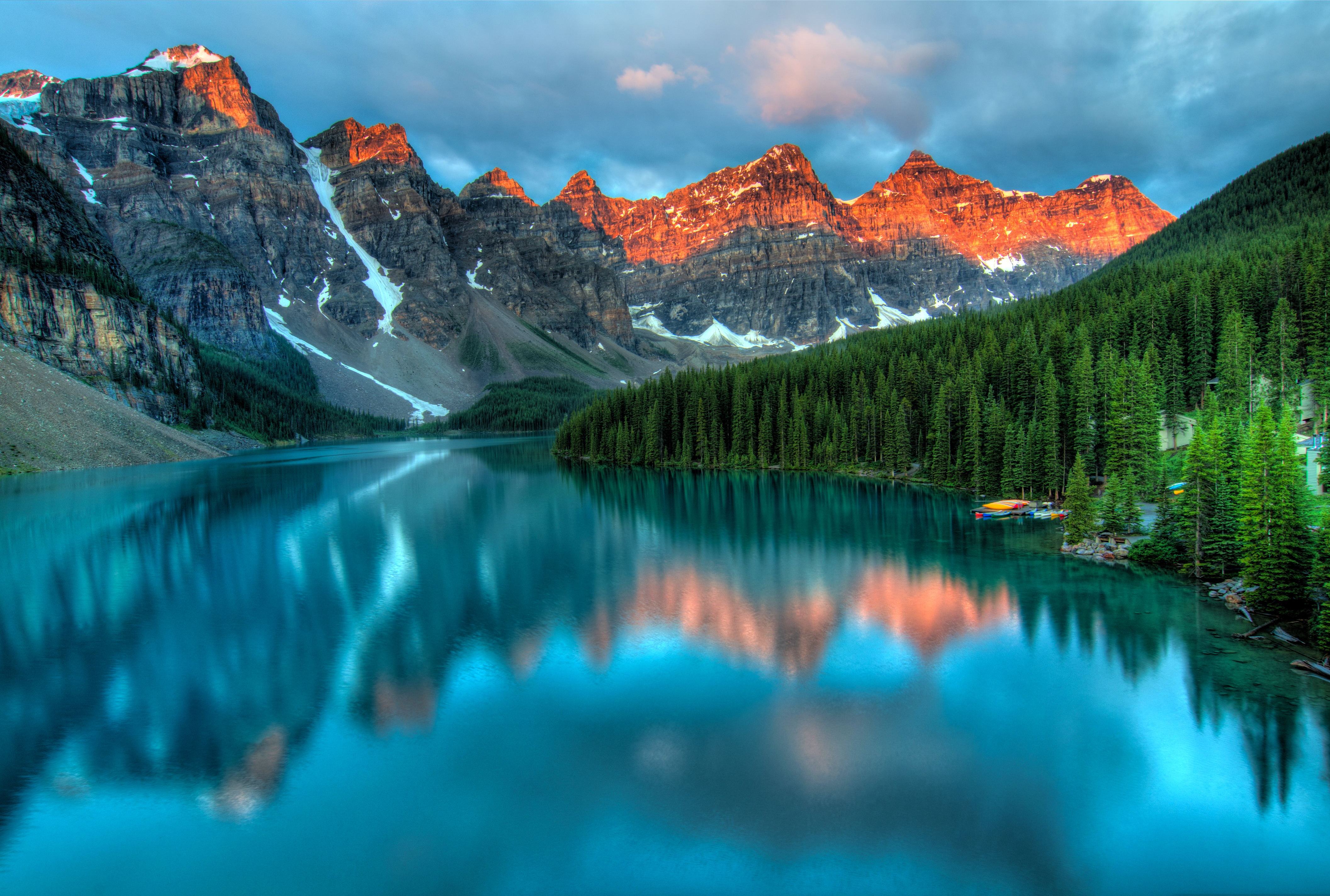 Sunrise on Moraine Lake